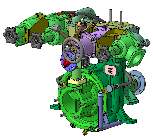 Насос пожарный, центробежный, нормального давления. Производительность - 40 л/с, напор - 100 м, номинальные обороты вращения - 2700 об/мин